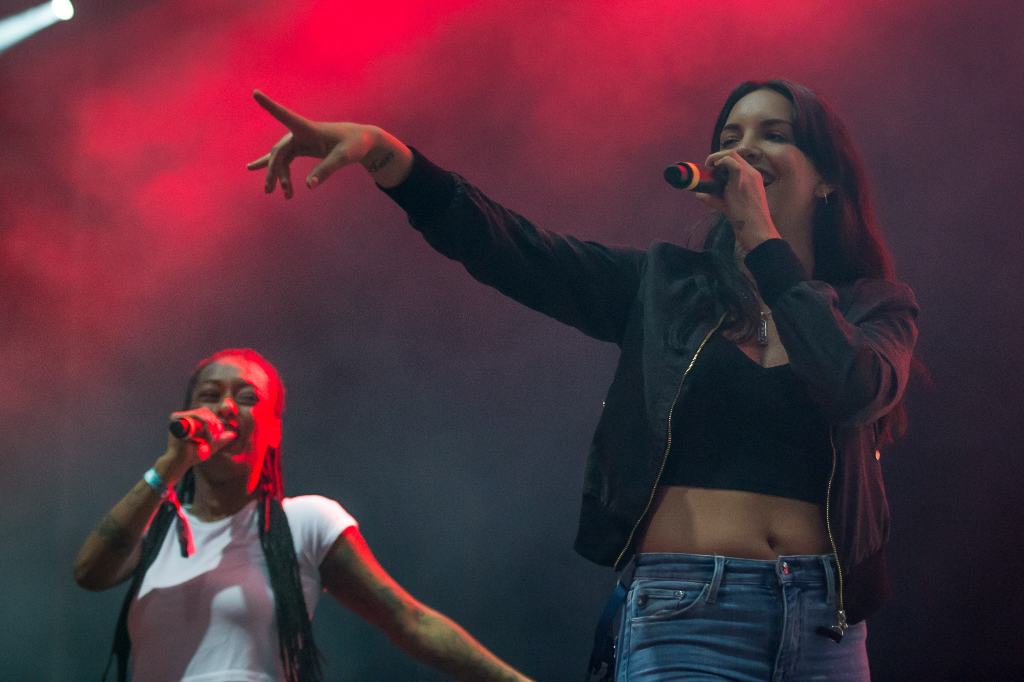 Deichbrand,ESK Events & Promotion GmbH,Festival,Juju,Konzert,Livekonzert,Livemusik,Nura,Palastzelt,SXTN,Sea-Airport Cuxhaven/Nordholz,See-Flughafen Cuxhaven/Nordholz,Seeflughafen Cuxhaven/Nordholz